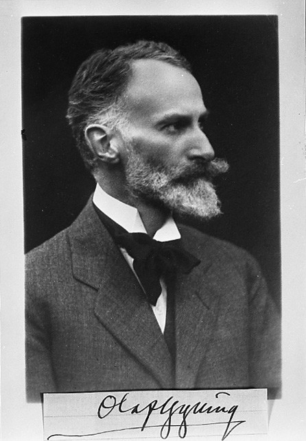 Porträtt på Olof Gylling. Samlingar av Göteborgs Naturhistoriska museum.